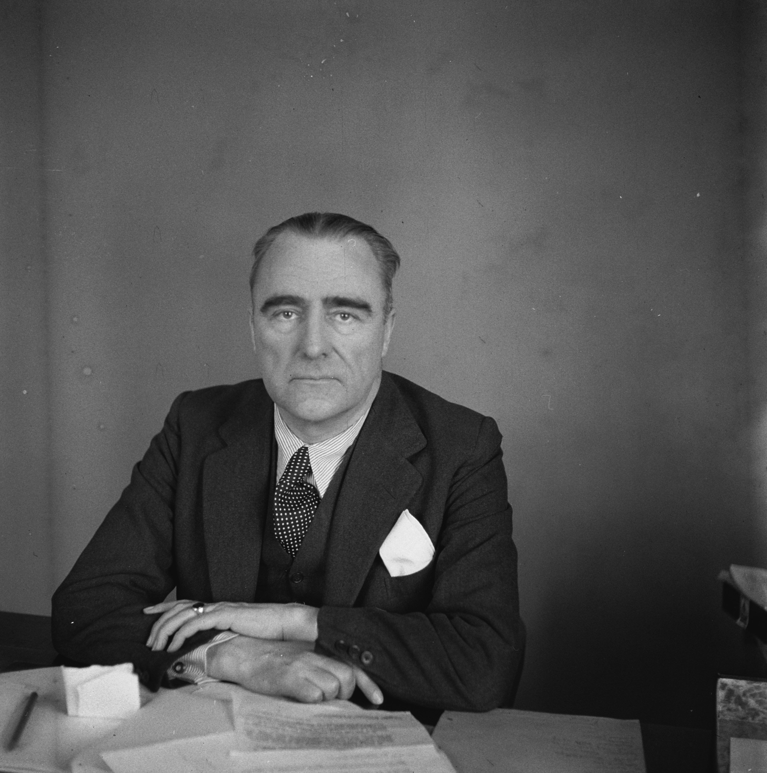 Collectie / Archief : Fotocollectie Anefo Reportage / Serie : P [Portraits/Persons] / Anefo Londen serie Beschrijving : C. Droogleever Fortuyn Annotatie : Deze persoon zou niet Engelandvaarder Cees Drooglever Fortuyn (1922-1944) zijn Datum : maart 1942 Locatie : Groot-Brittannië, Londen Trefwoorden : ambtenaren, portretten, tweede wereldoorlog Persoonsnaam : Droogleever Fortuyn, C. Fotograaf : Onbekend / Publiek Domein Auteursrechthebbende : Nationaal Archief Materiaalsoort : Negatief (zwart/wit) Nummer archiefinventaris : bekijk toegang 2.24.01.03 Bestanddeelnummer : 935-0589